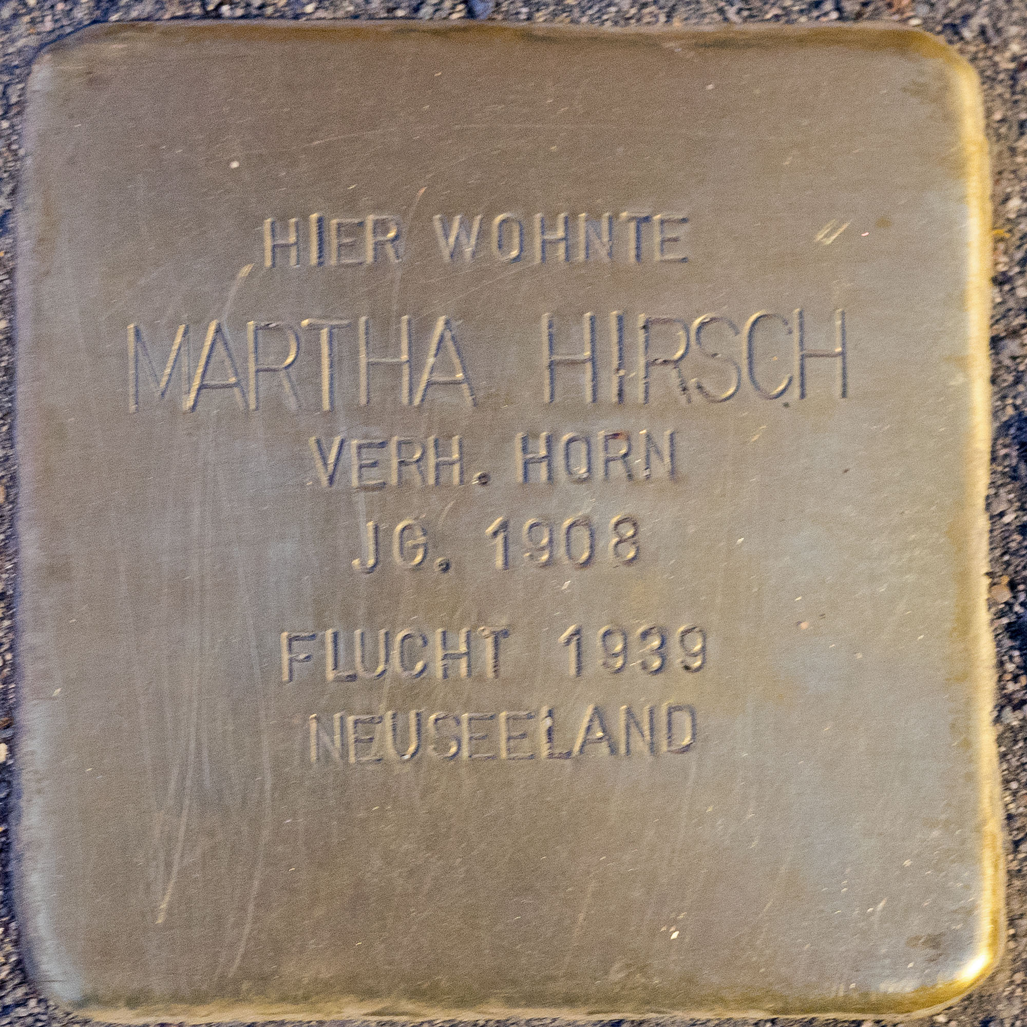 2016 11 25 Stolpersteine Kempen Hirsch Martha